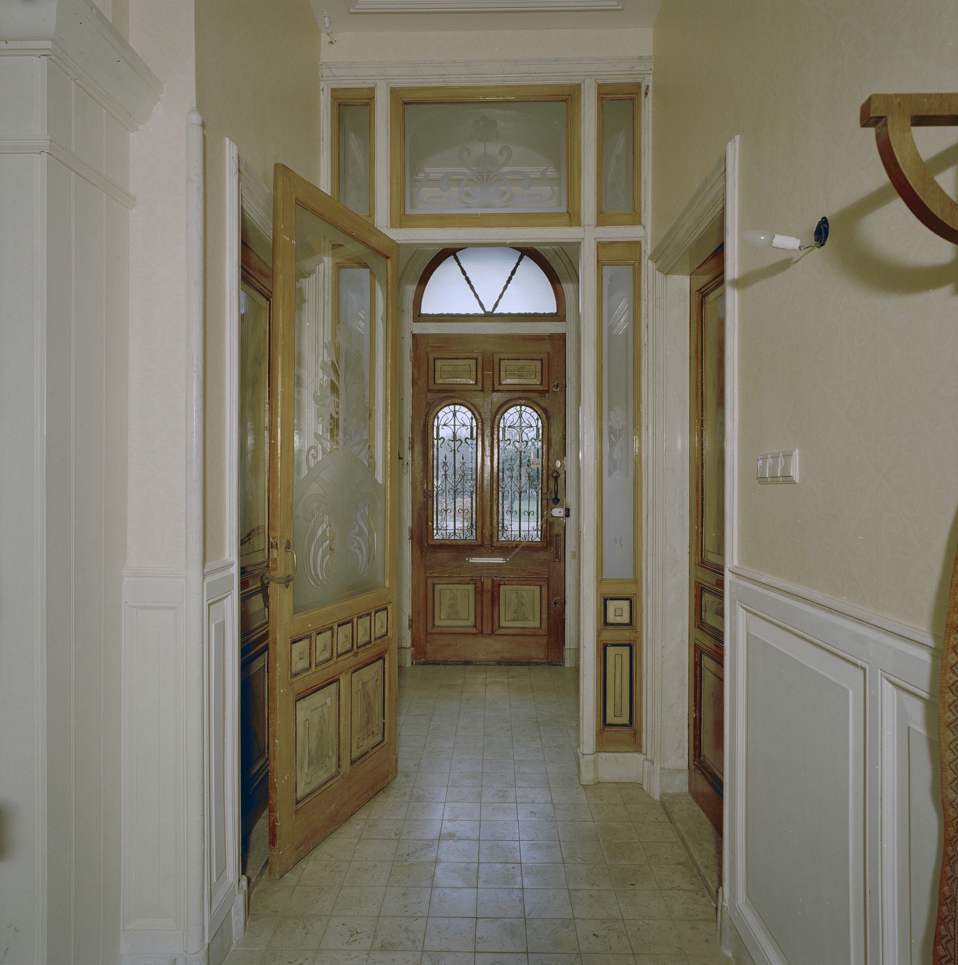 Huize Petronella: Interieur, gedeelte van de gang met openstaande tochtpui en zicht op het tochtportaal met de binnenzijde van de voordeur